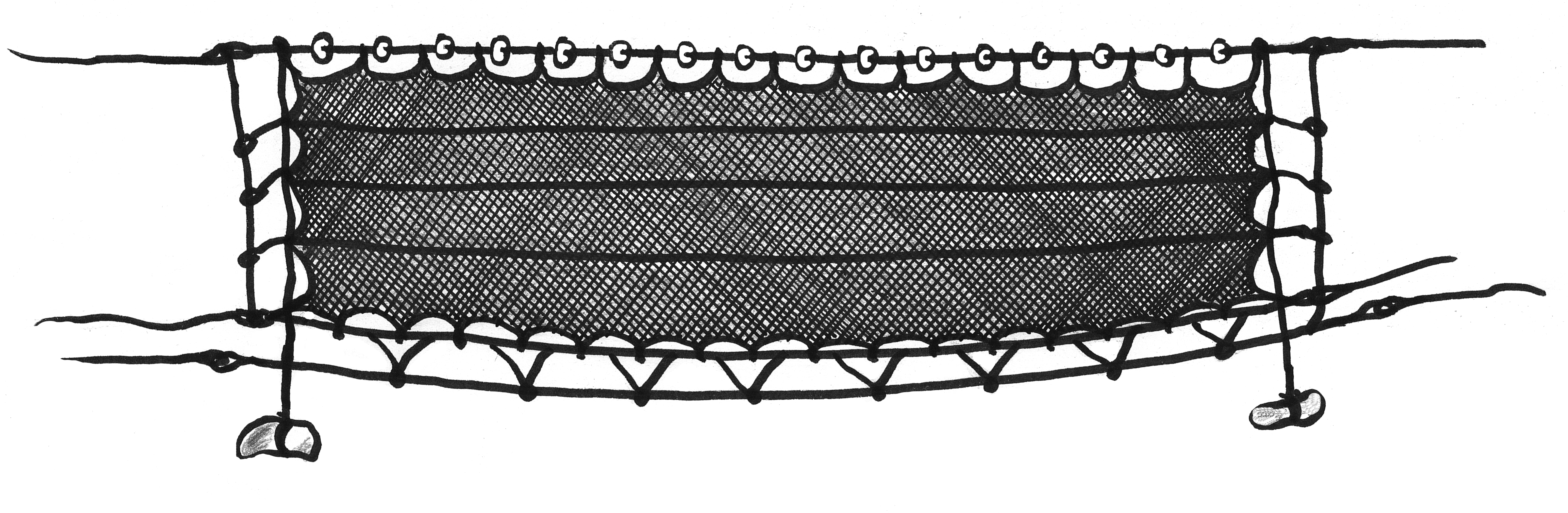 Bolintx